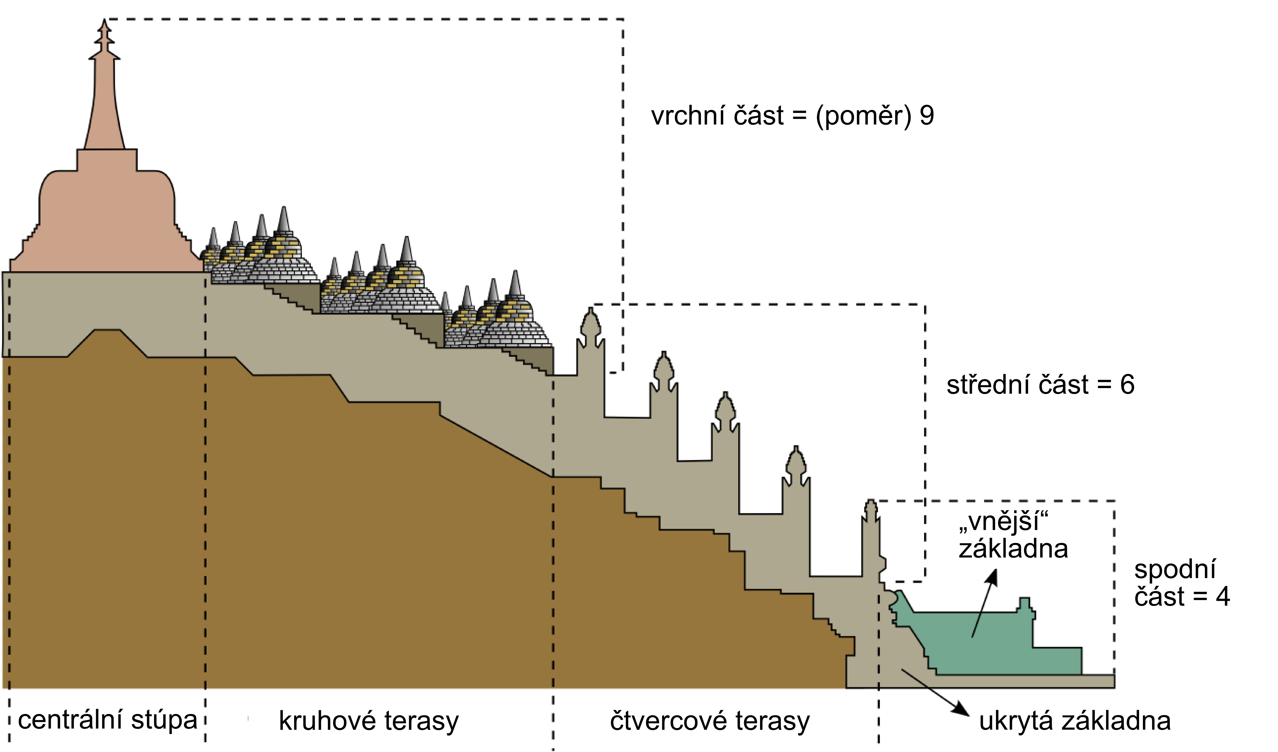 Řez Borobudurem. Vertikálně je pomyslně rozdělen do čtyř částí – základové (obsahuje obě dvě základny, čili viditelnou i „skrytou“), dále do části obsahující čtvercové terasy, další obsahuje terasy o kruhovém půdoryse a ve středu stavby se nachází hlavní stúpa. Horizontálně je Borobudur pomyslně rozdělen do tří částí, (vrchní, střední, spodní), kdy jednotlivé části jsou mezi sebou v poměru 9:6:4. Tento poměr byl nalezen i na dalších částech stavby.